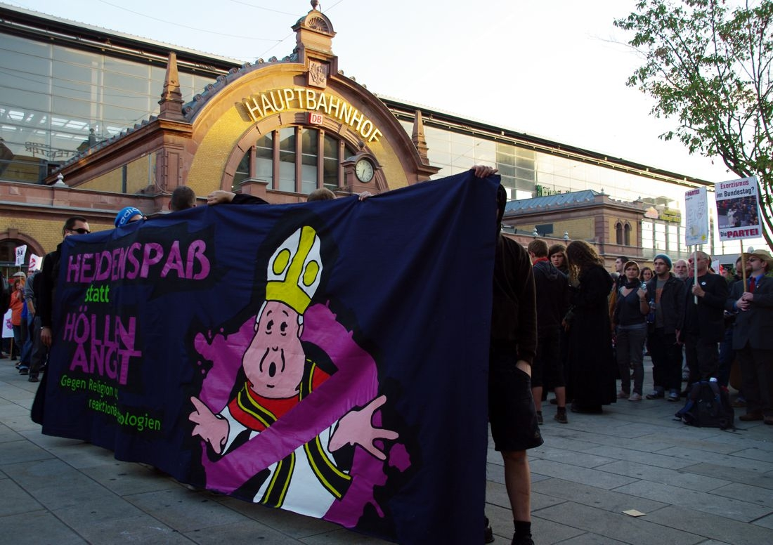 Proteste anlässlich des Papstbesuches in Erfurt. Der Protestumzug sammelte sich am Erfurter Hauptbahnhof und zog dann auf indirektem Wege zum Anger, wo er endete. Kundgebungen gab es am Hauptbahnhof, vor der Staatskanzlei und auf dem Anger.